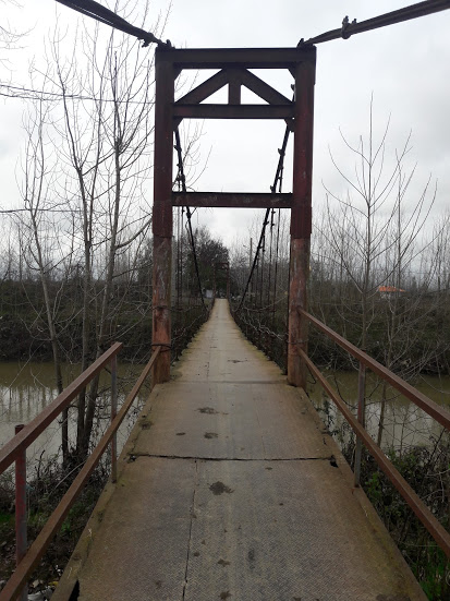 گیلکی: نوخاله بالامحله پورد